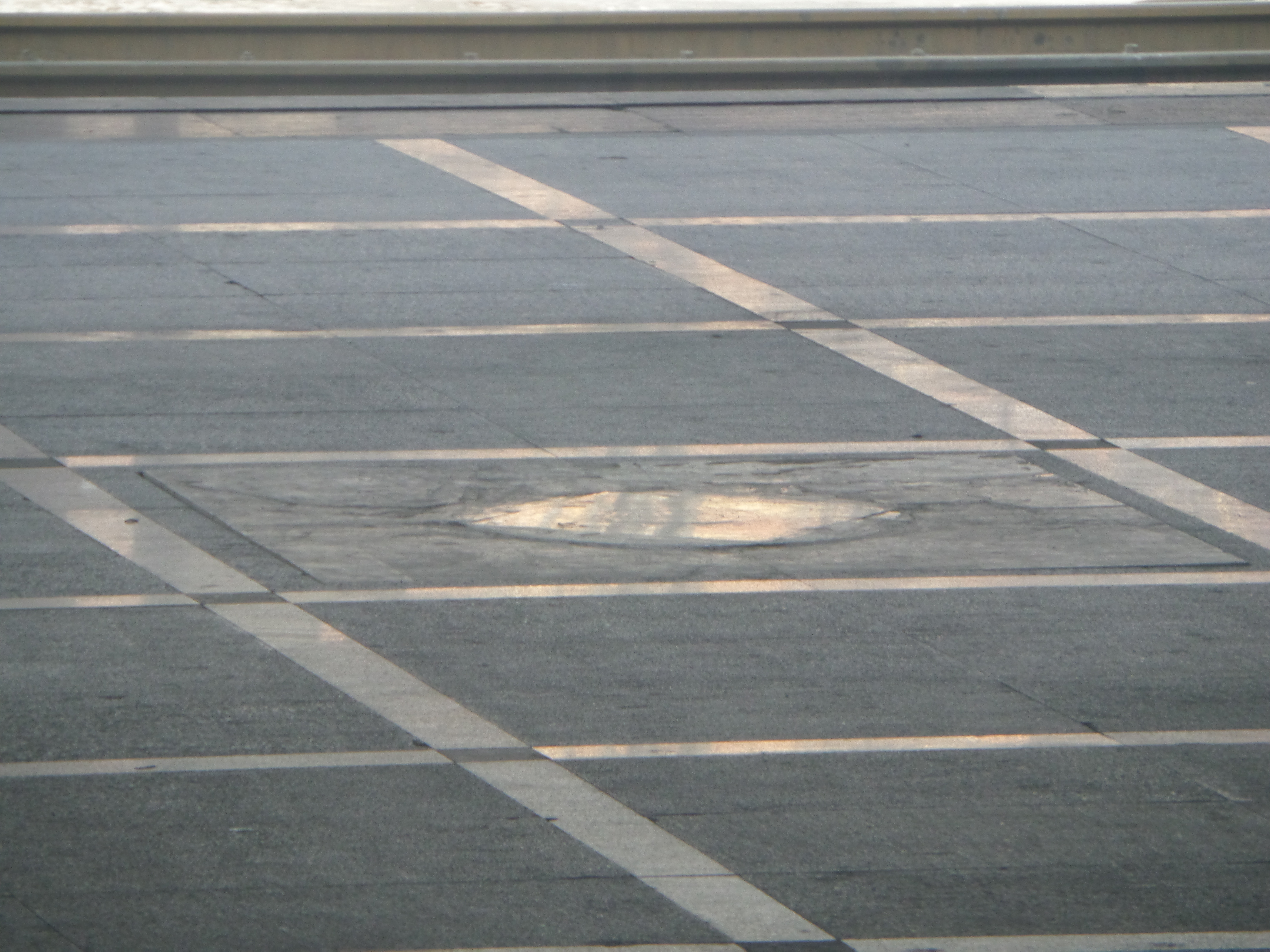 하얼빈역 1번 플렛폼에서 안중근 의사의 저격으로 이토 히로부미가 쓰러진 곳